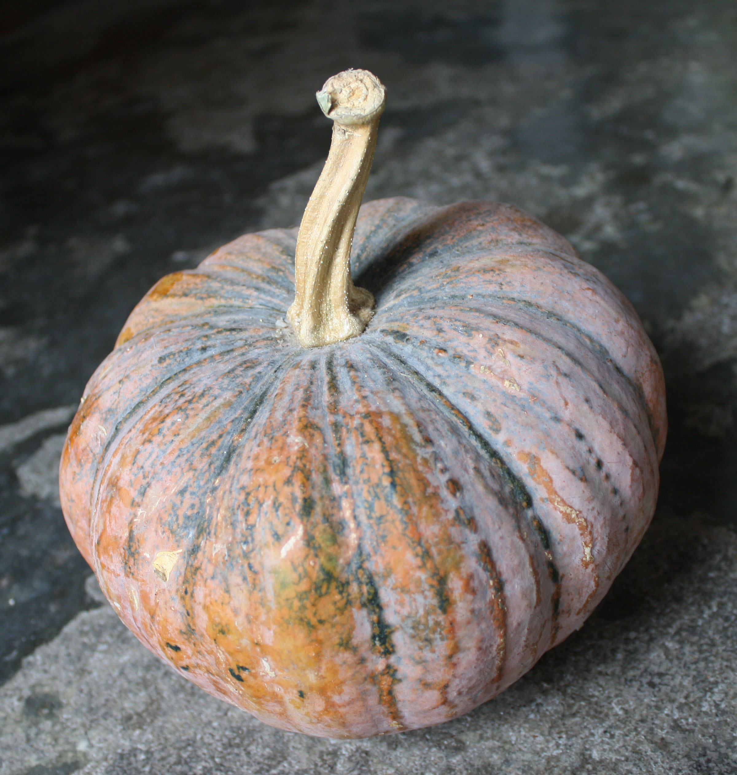 Waluh adalah salah satu jenis buah yang ada di Jawa tengah Indonesia